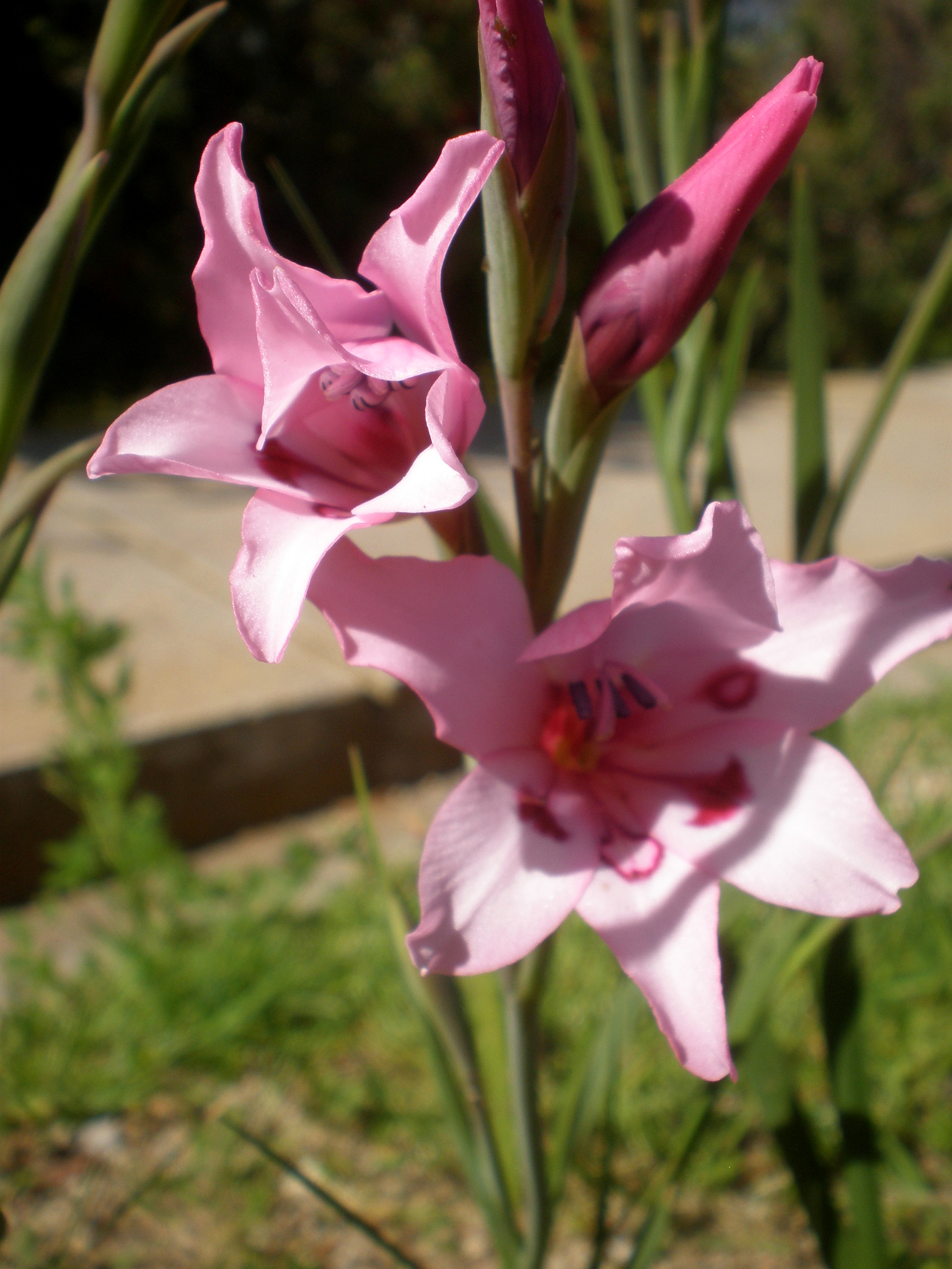 Jardín Botánico de Barcelona.